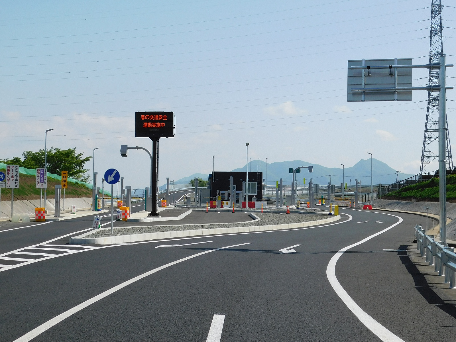 岩手県滝沢市にある東北自動車道滝沢中央スマートインターチェンジの料金所を一般道側から。